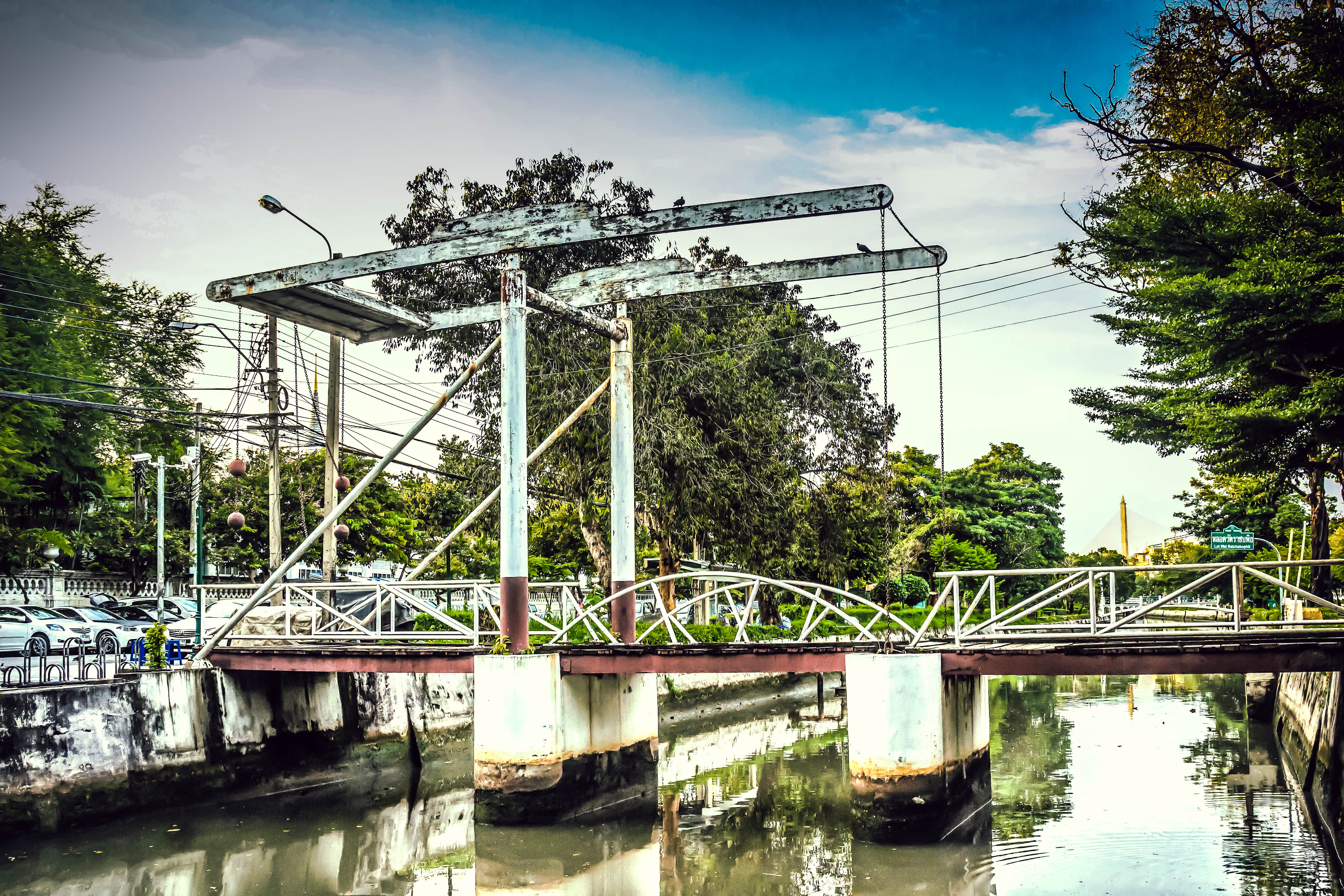 สะพานหก